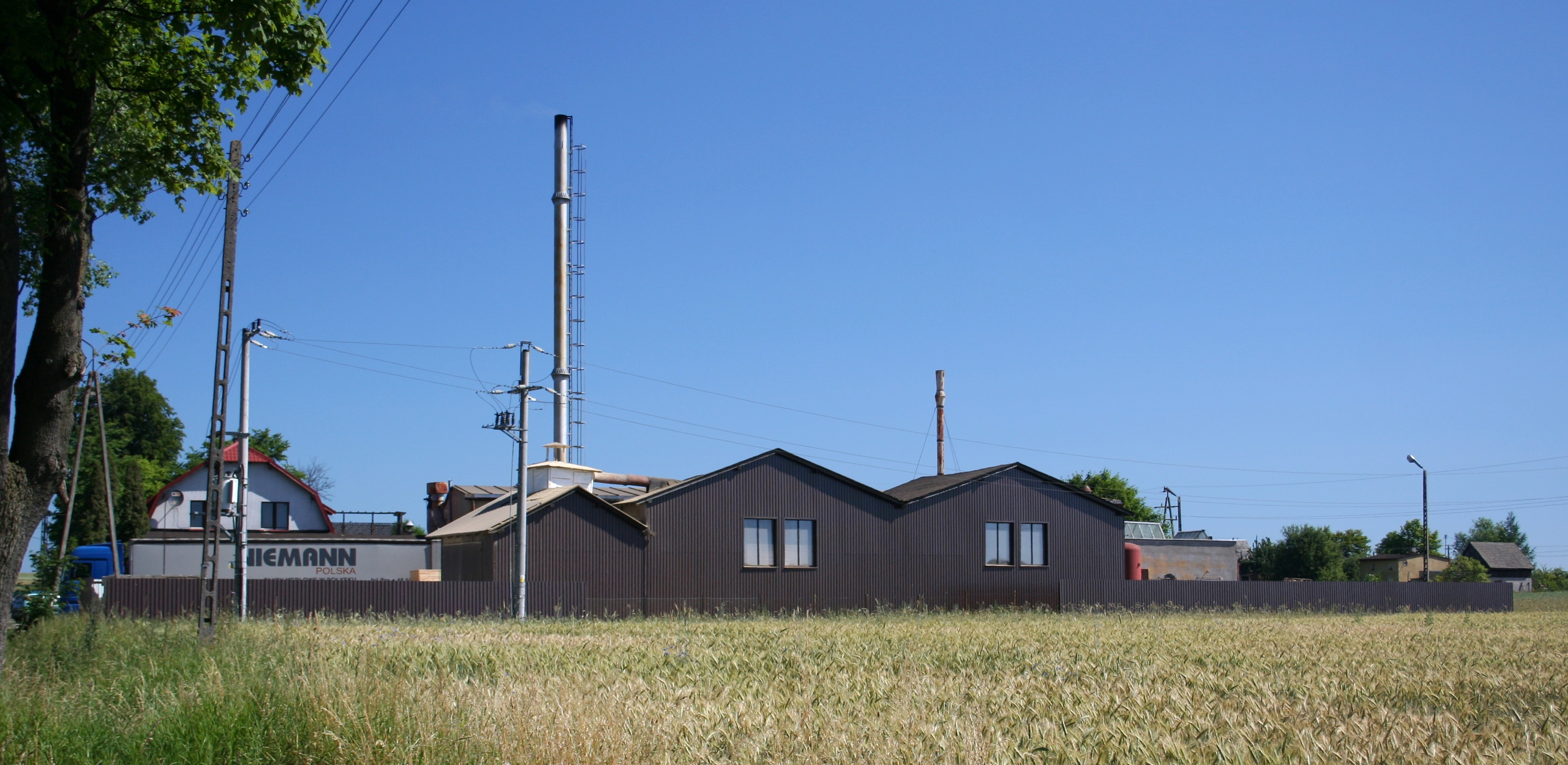 Łubno, zakład stolarski, powiat chojnicki